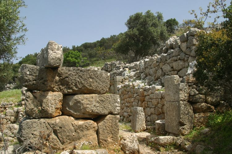 Eingang in die Siedlung Lato